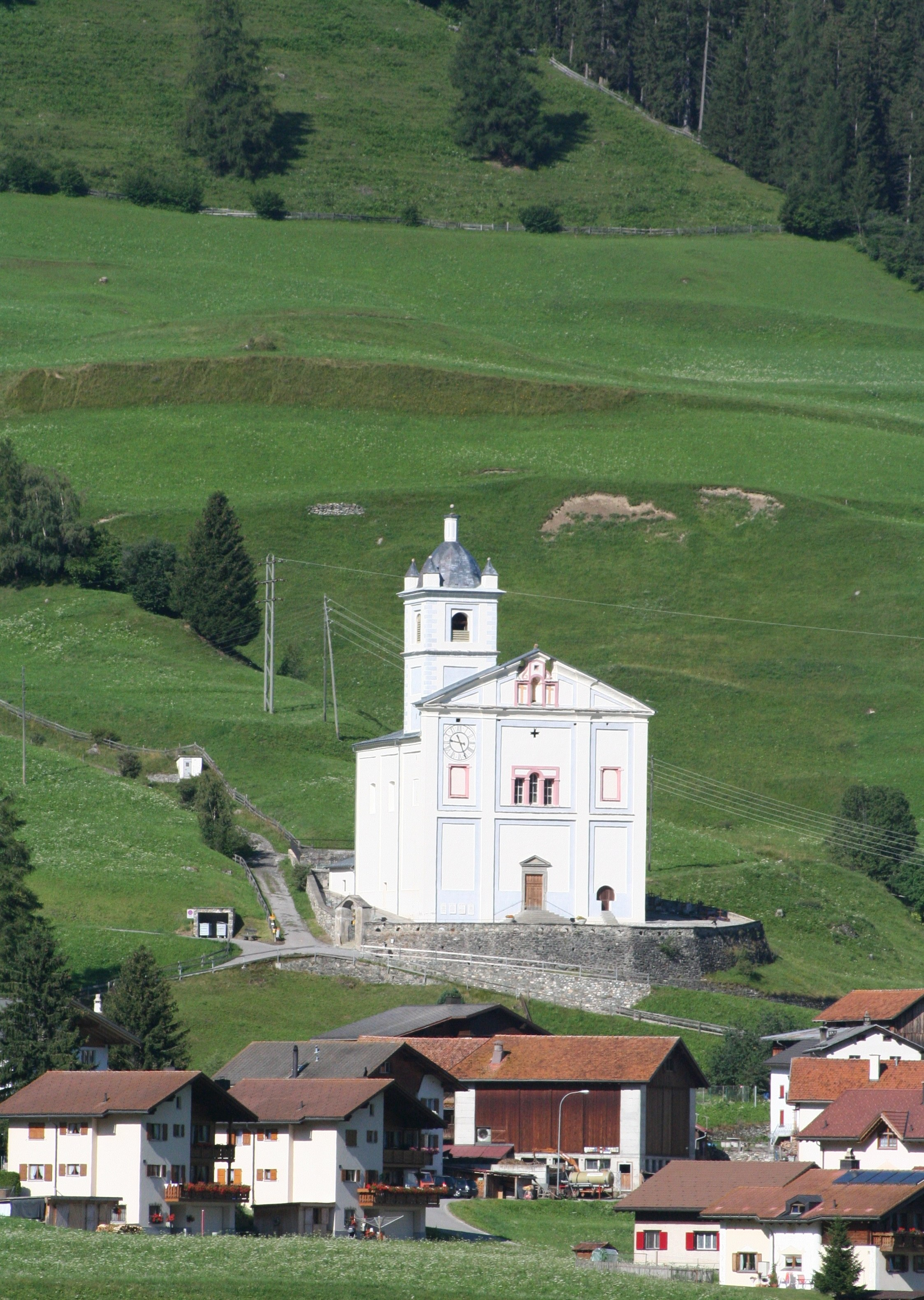 Kirche S. Mitgel, Savognin Rumantsch: Baselgia Son Mitgel, Savognin